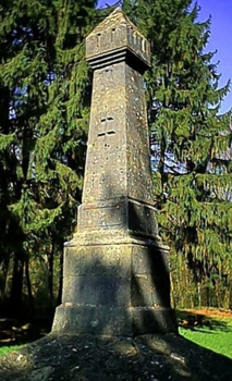 Monument érigé en 1896 (Francis MONTIGNON) GFDL Francis MONTIGNON